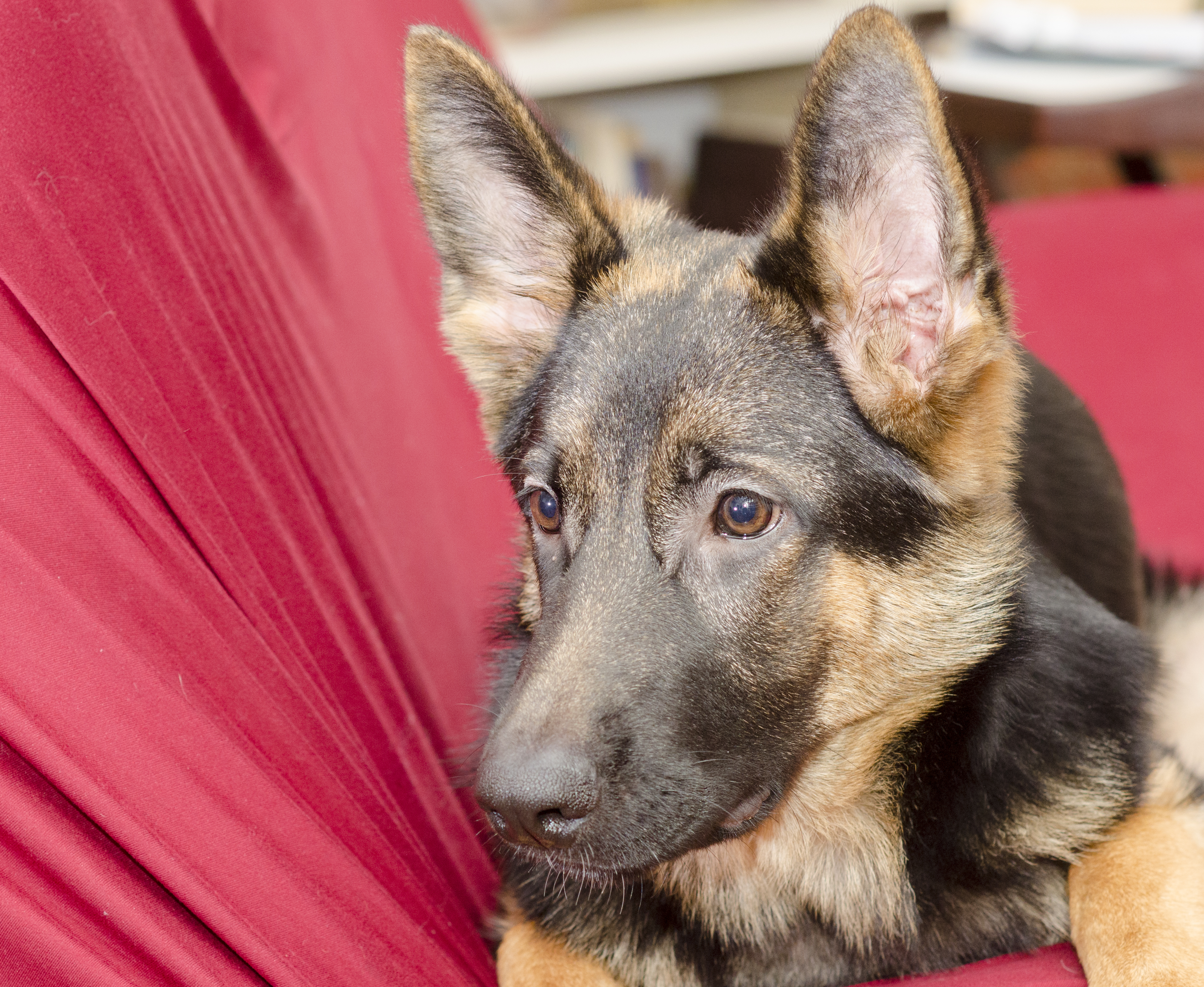 Perra ovejera alemán cabeza